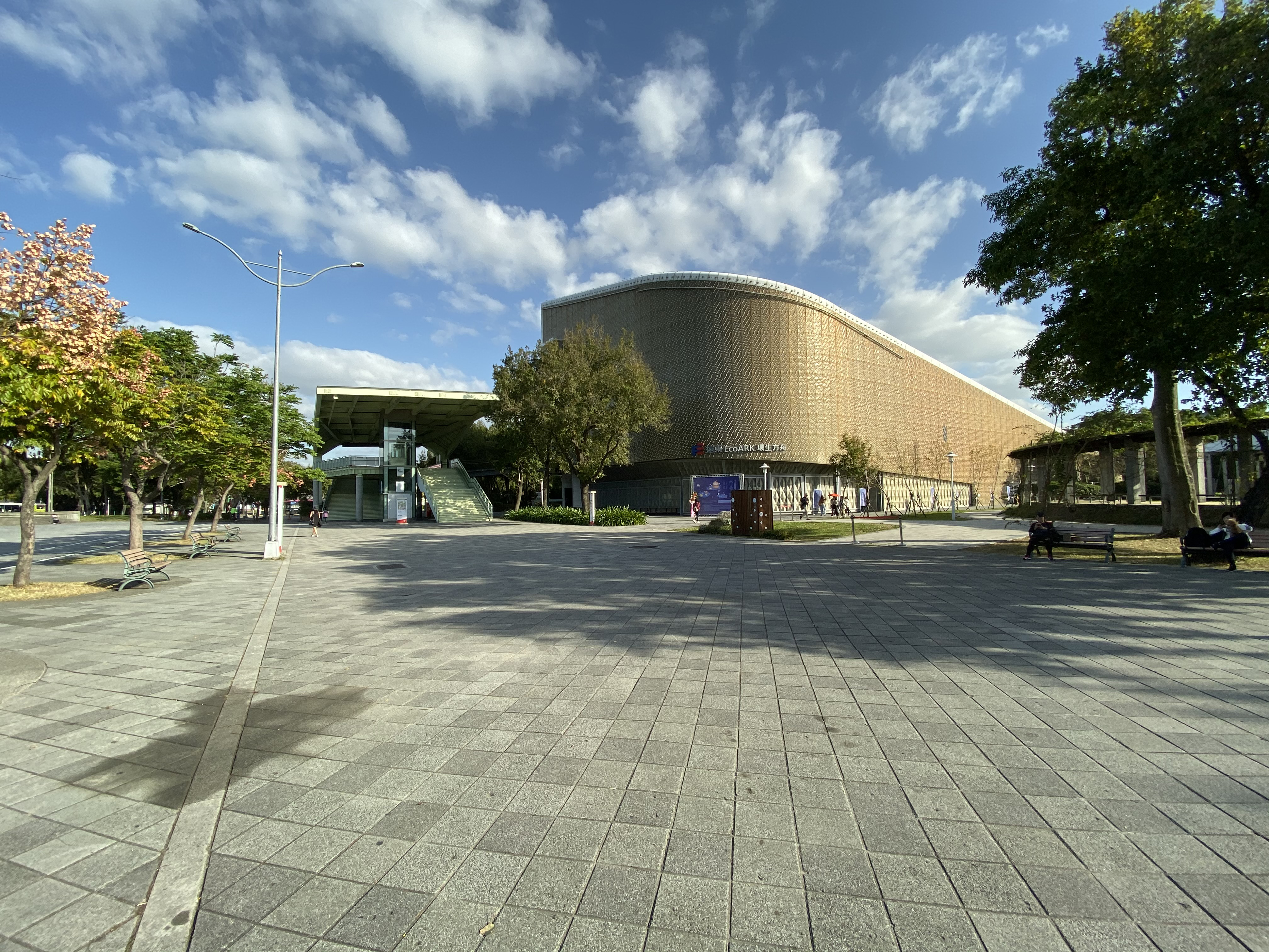 臺北花博遠東流行館